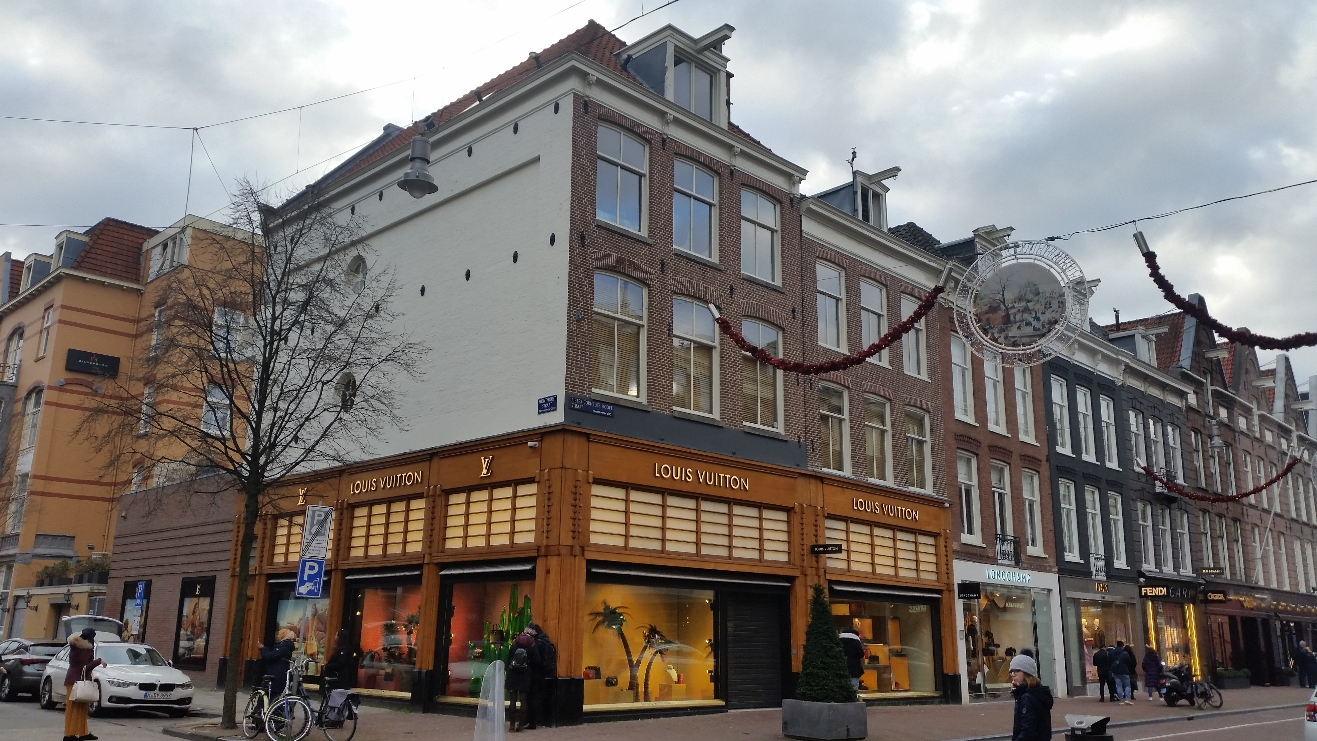 Hoek P.C. Hooftstraat 67, Honthorststraat 2, Amsterdam-Zuid, met winkel van Louis Vuitton (het maakt geen deel uit van monument Honthorststraat 2a-16)